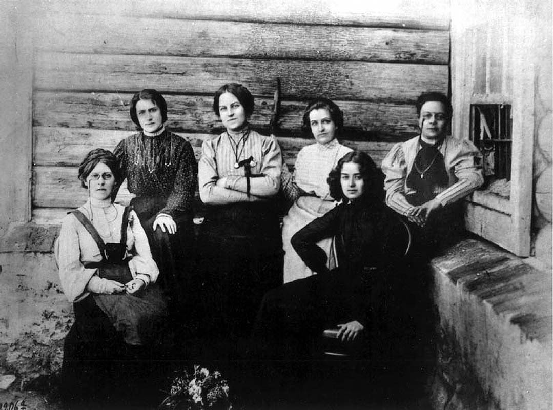 Spiridónova, Shkol'nik, Bitsenko, Izmajlovich, Fialka, Ezerskaja en su exilio siberiano.